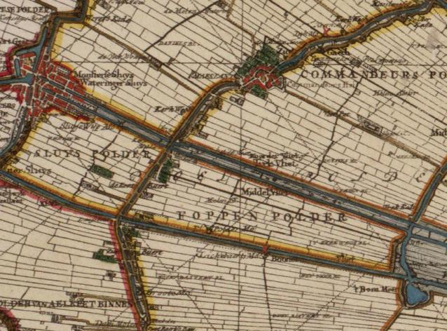 Sluispolder en Foppenpolder.